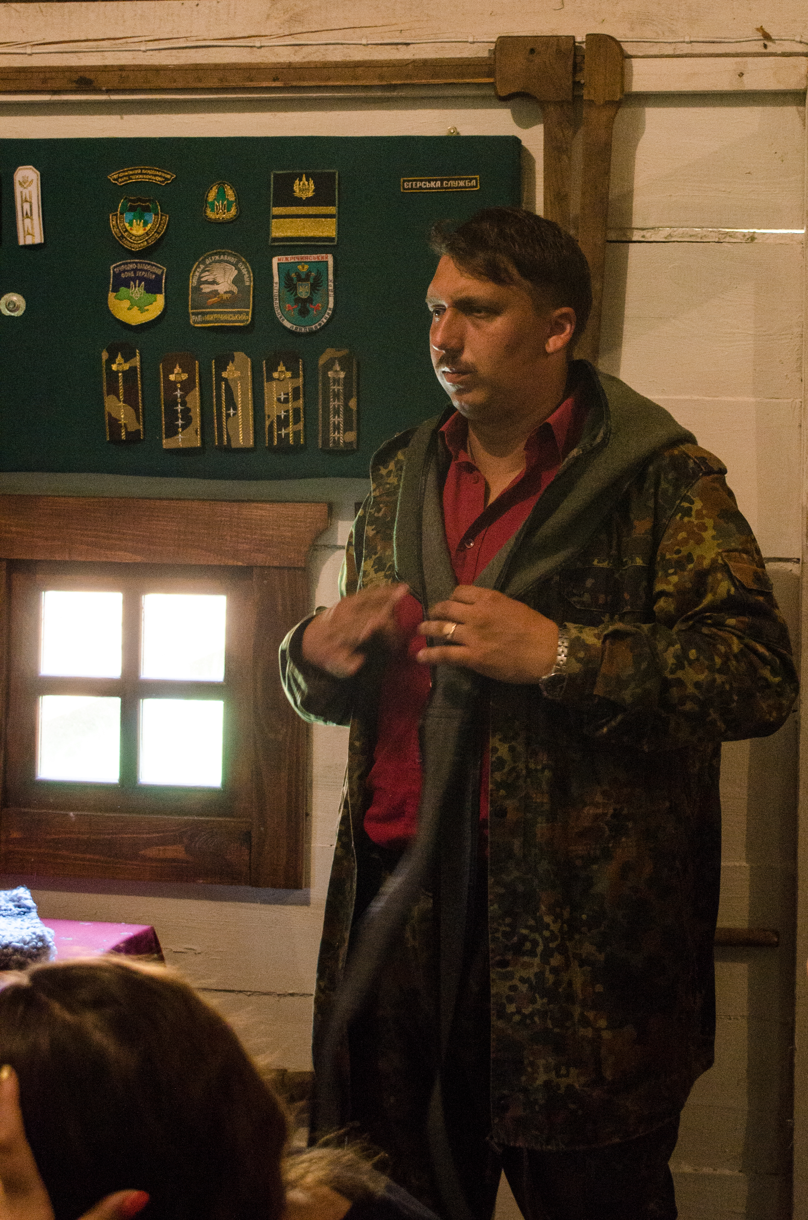 Міжрічинський, міжріччя Дніпра та Десна на території Козелецького та Чернігівського районів